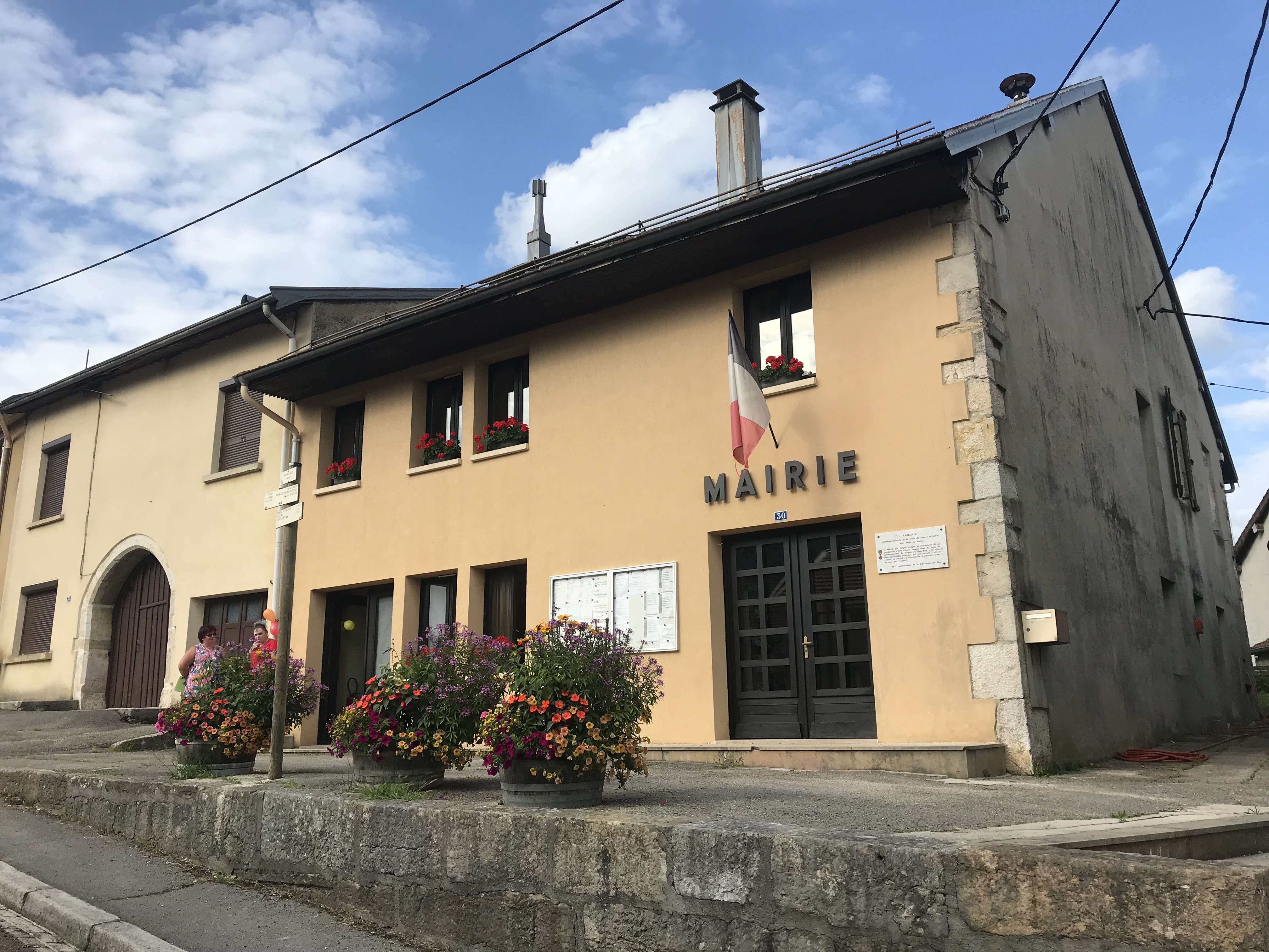 Ravilloles, Jura, France.